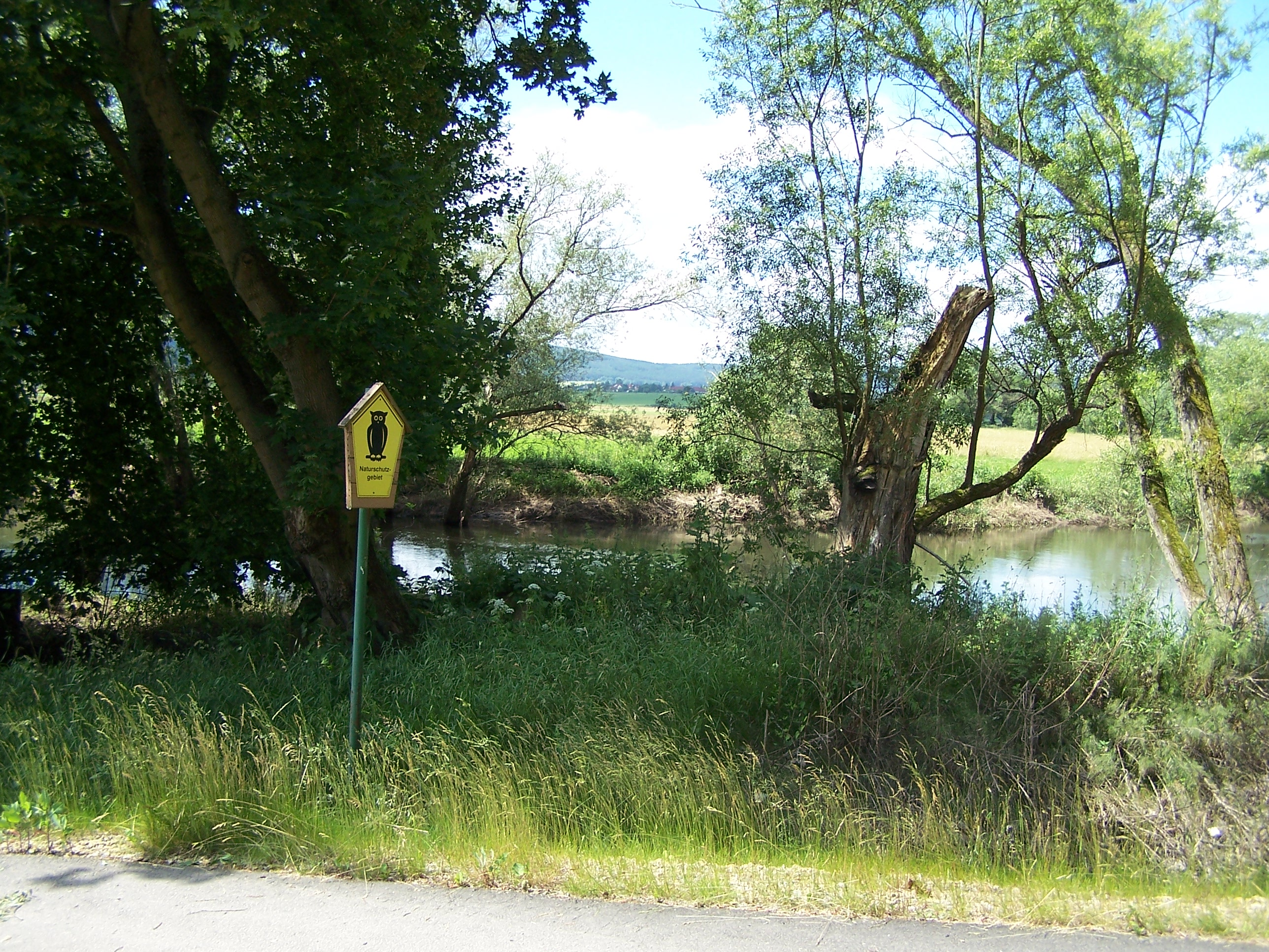 Als Naturschutzgebiet ausgewiesene Uferzone der Werra bei Unterrohn.